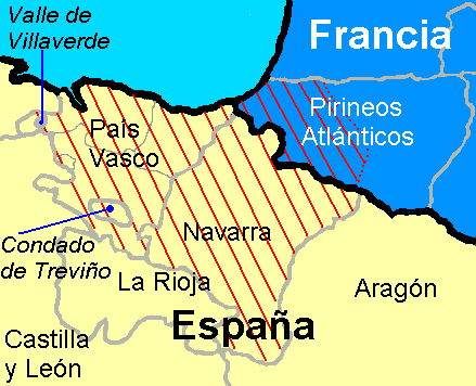 Territorio reivindicado como Euskal Herria